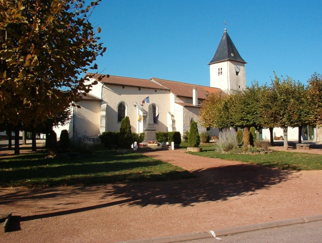 La place principale avec le monument aux Morts (© Francis MONTIGNON) GFDL Francis MONTIGNON Catégorie:Image de commune de Meurthe-et-Moselle